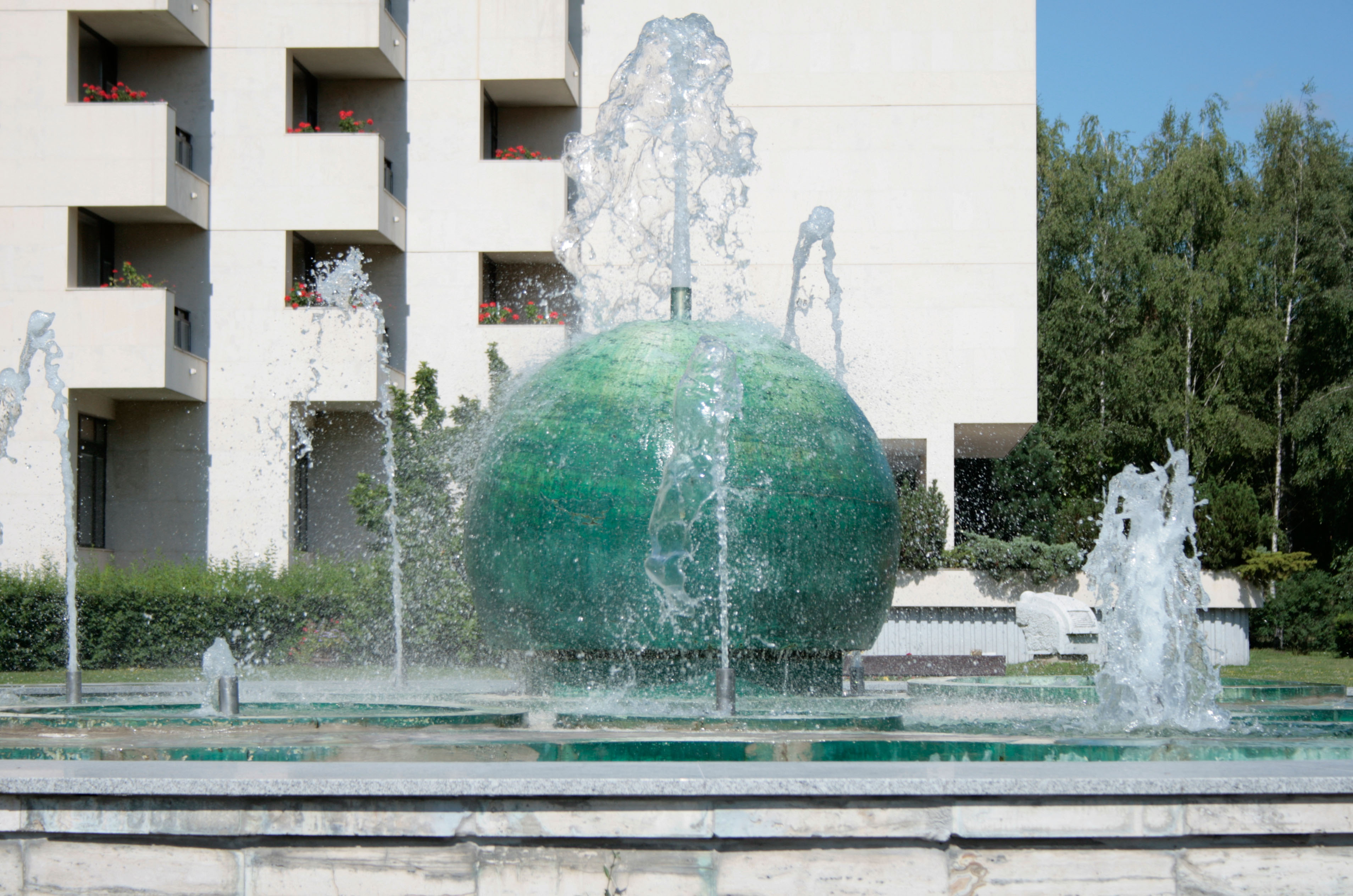 Fontana v areáli kúpeľného komplexu Diamant